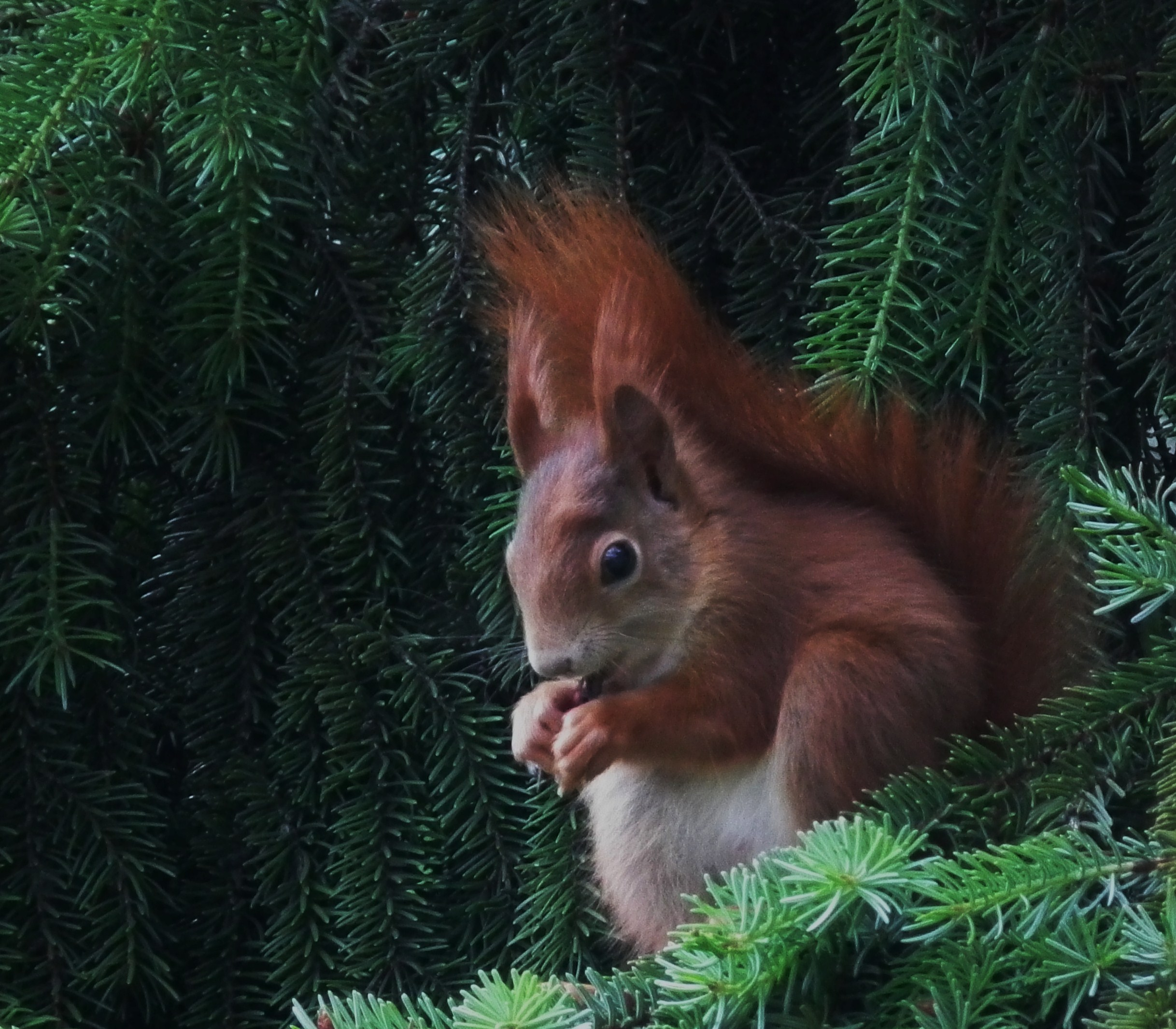 Europäisches Eichhörnchen (Sciurus vulgaris), fotografiert in Plankstadt (Baden-Württemberg, Deutschland)